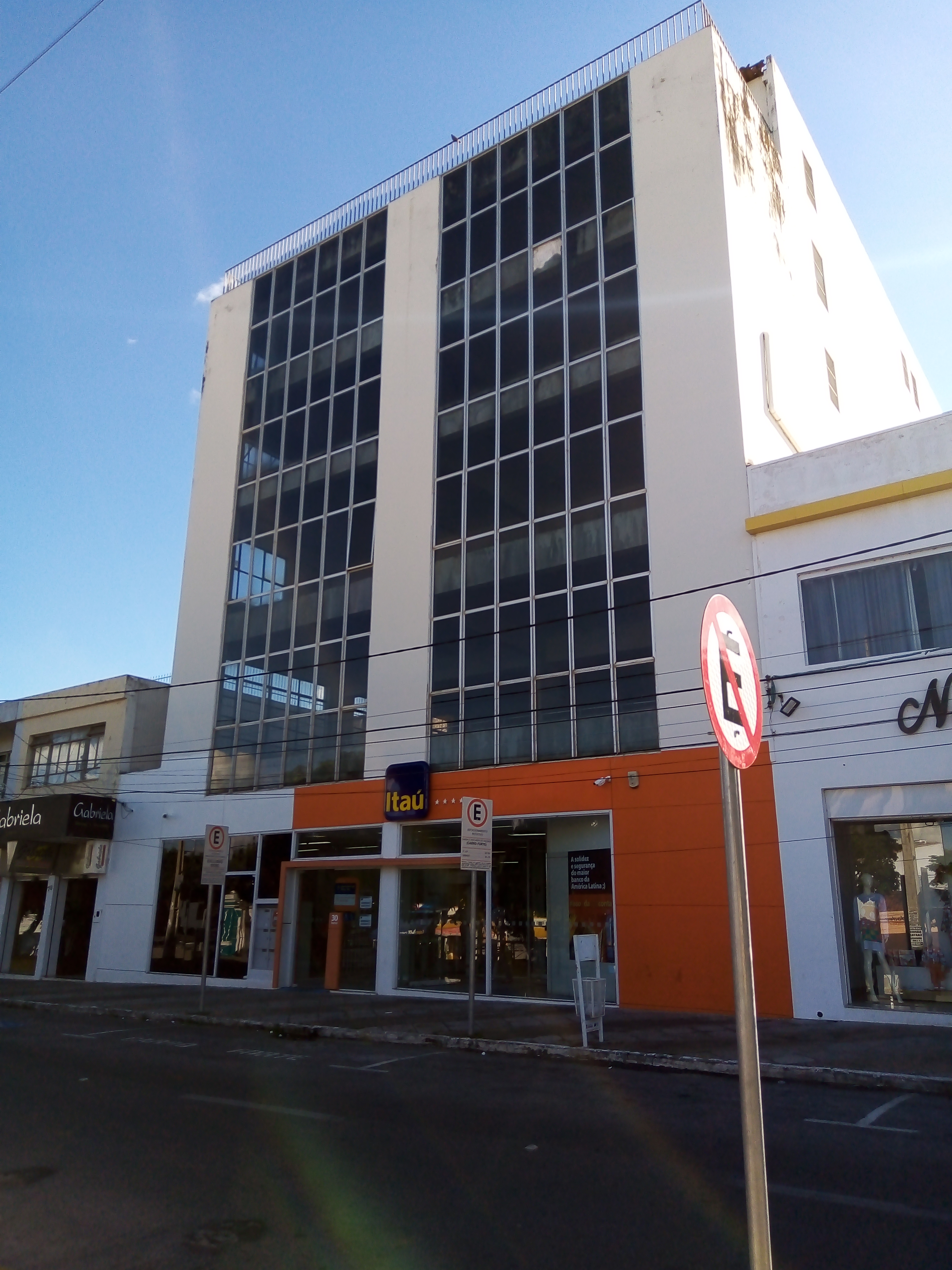 Como acima